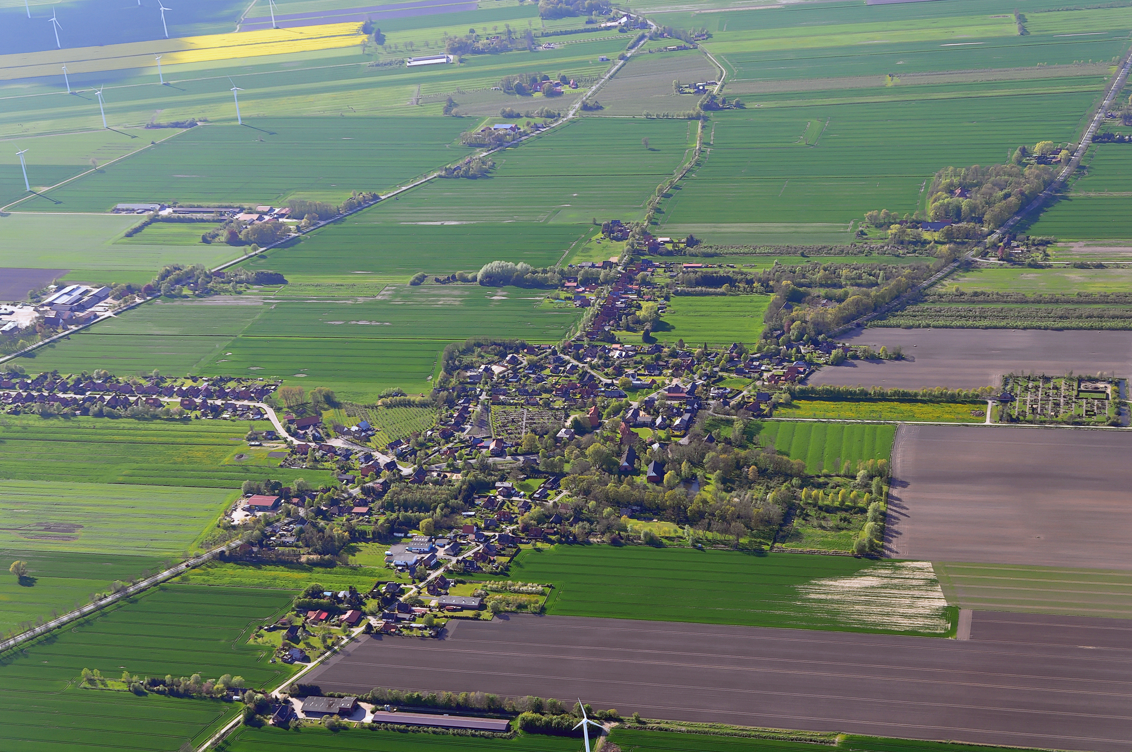 Luftbilder von der Nordseeküste 2012-05